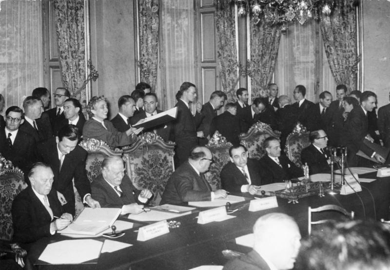 Adenauer handelte in Paris entgegen den nationalen Interessen des deutschen Volkes (Frankreich). Adenauer hat durch die Unterzeichnung der in den letzten Tagen in Paris mit den Westmächten ausgehandelten Abmachungen über die Remilitarisierung Westdeutschlands den Rüstungsindustriellen und Revanchisten Westdeutschlands den Weg geebnet und die Wiedervereinigung Deutschlands zu einer Angelegenheit der Westmächte erklärt. Bei dem französischen Volk sind die Verhandlungsergebnisse auf großen Widerstand gestoßen, und zahlreiche Delegationen begaben sich mit Protestresolutionen zum Palais de Chaillet, in dem über den EVG-Ersatz beraten wurde. U. B. z.: Adenauer (links) unterzeichnet am 23. Oktober 1954 im Quai d´Orsay den neuen Schandvertrag